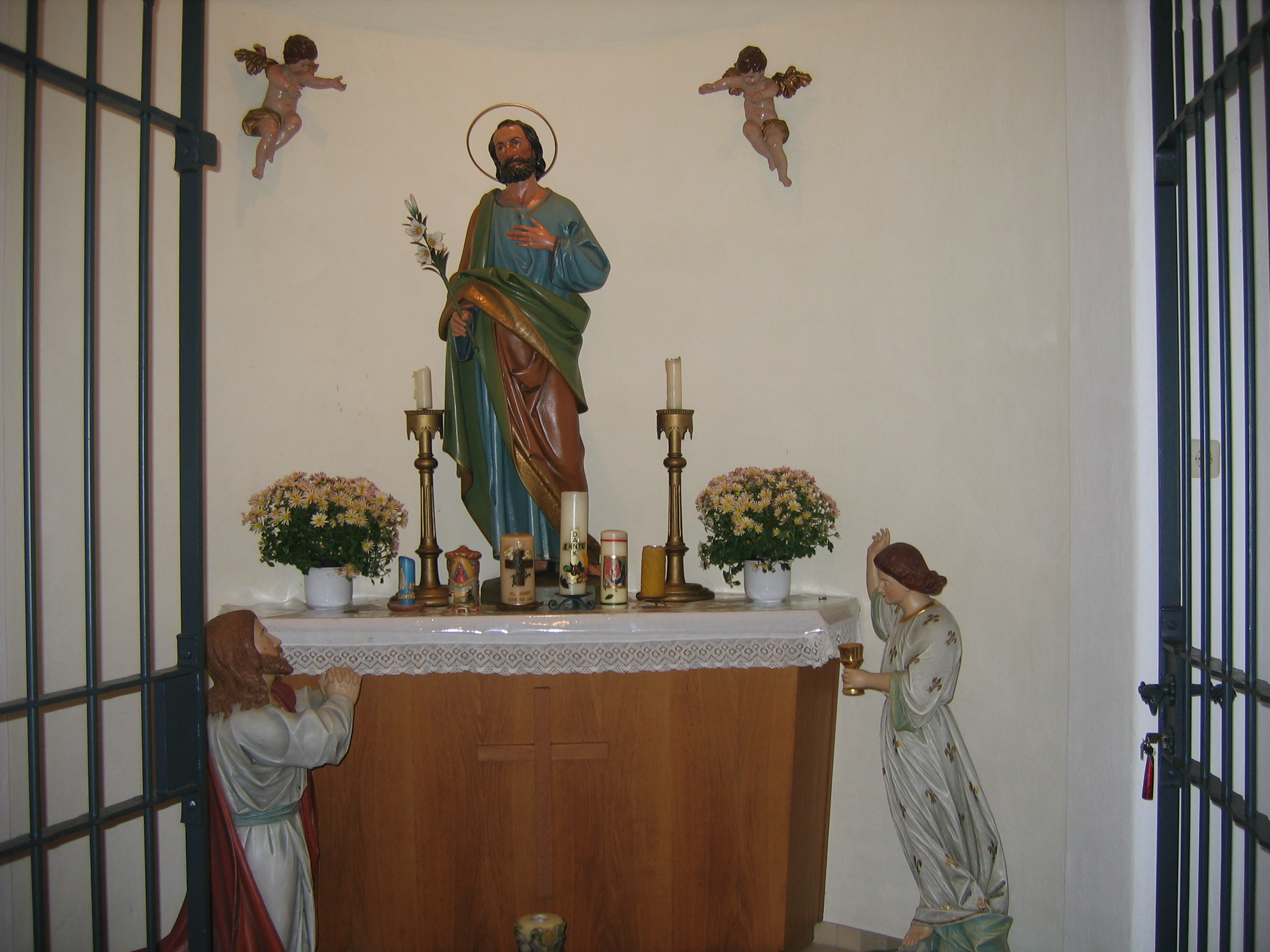 Das Innere der Kapelle von Hessenlohe